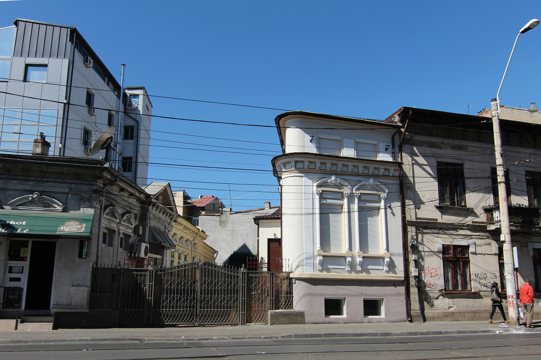 Casă pe strada Traian